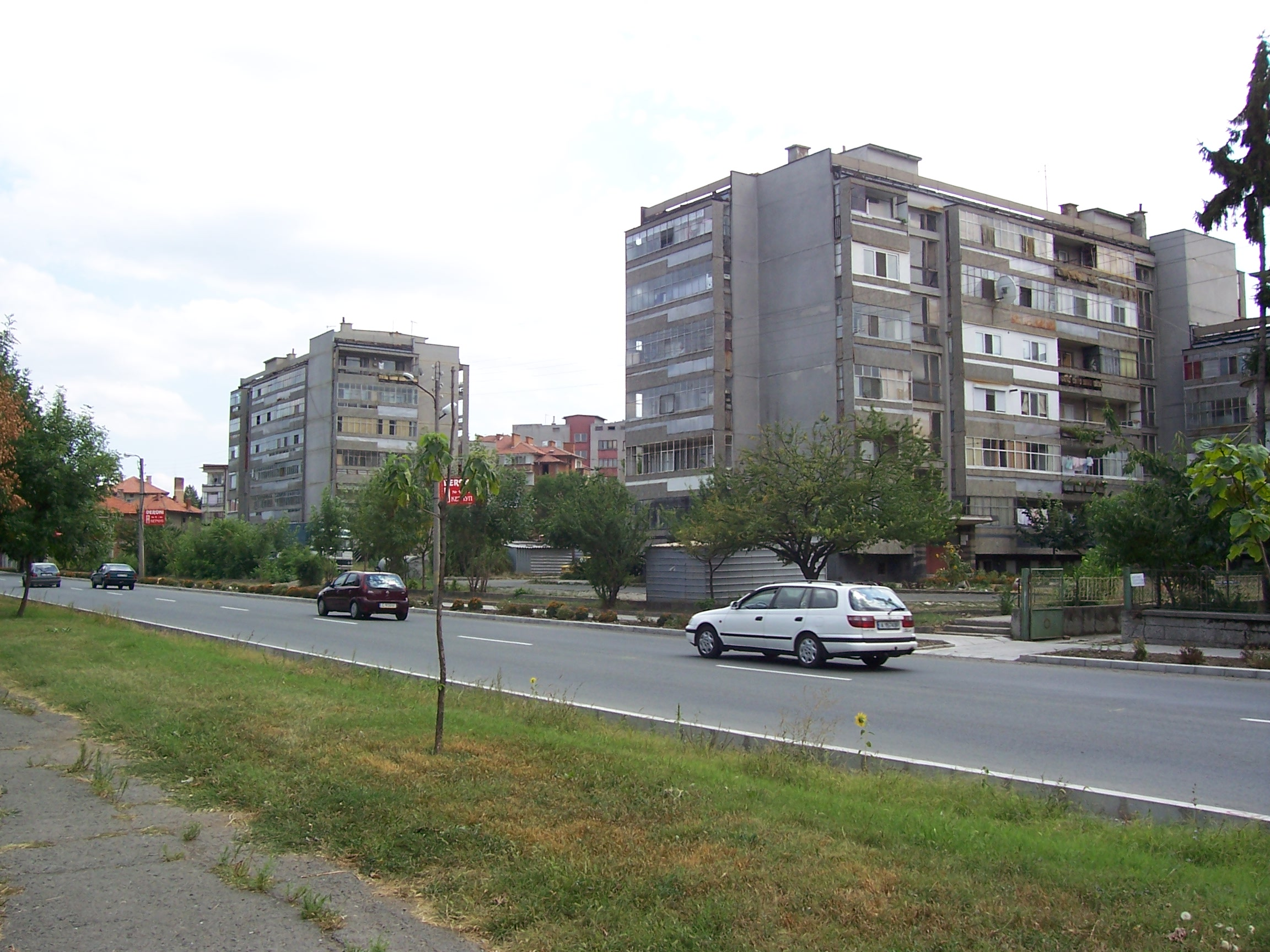 ул."Москва" - част от трасето София-Бургас; © 2006 Димитър Колев